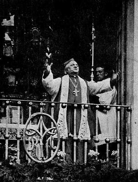 bp Władysław Bandurski w Ostrej Bramie w 10 rocznicę oswobodzenia Wilna przez wojska polskie (1929).